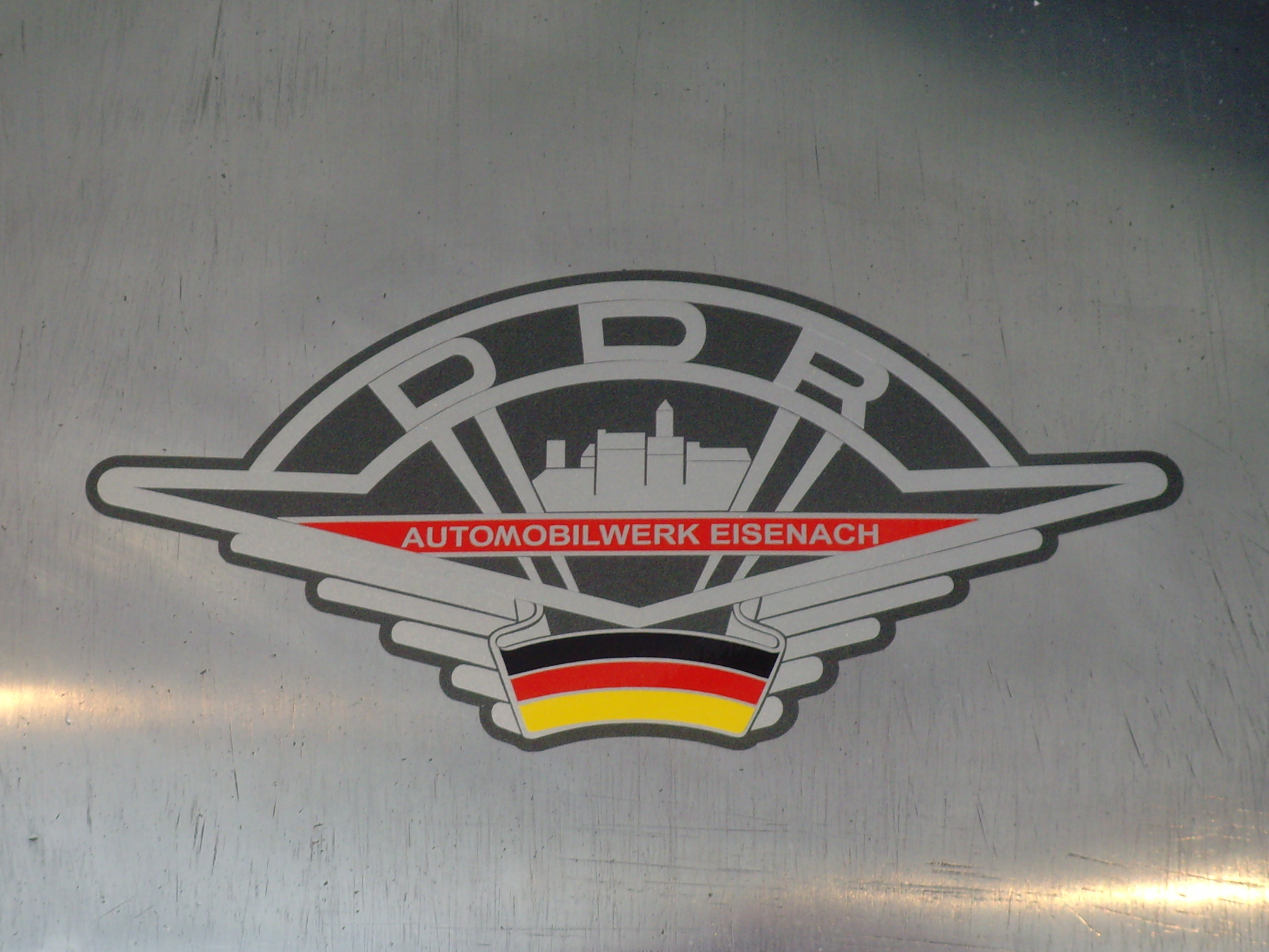 AWE R3 1,5l-Rennsportwagen 1956